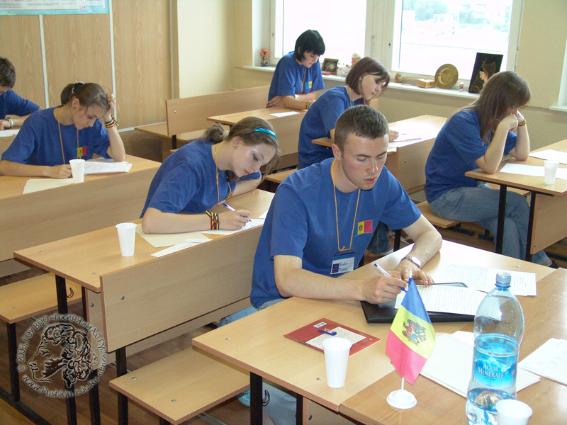 Поглед към отбора на Молдова на Международната олимпиада по руски език 2014